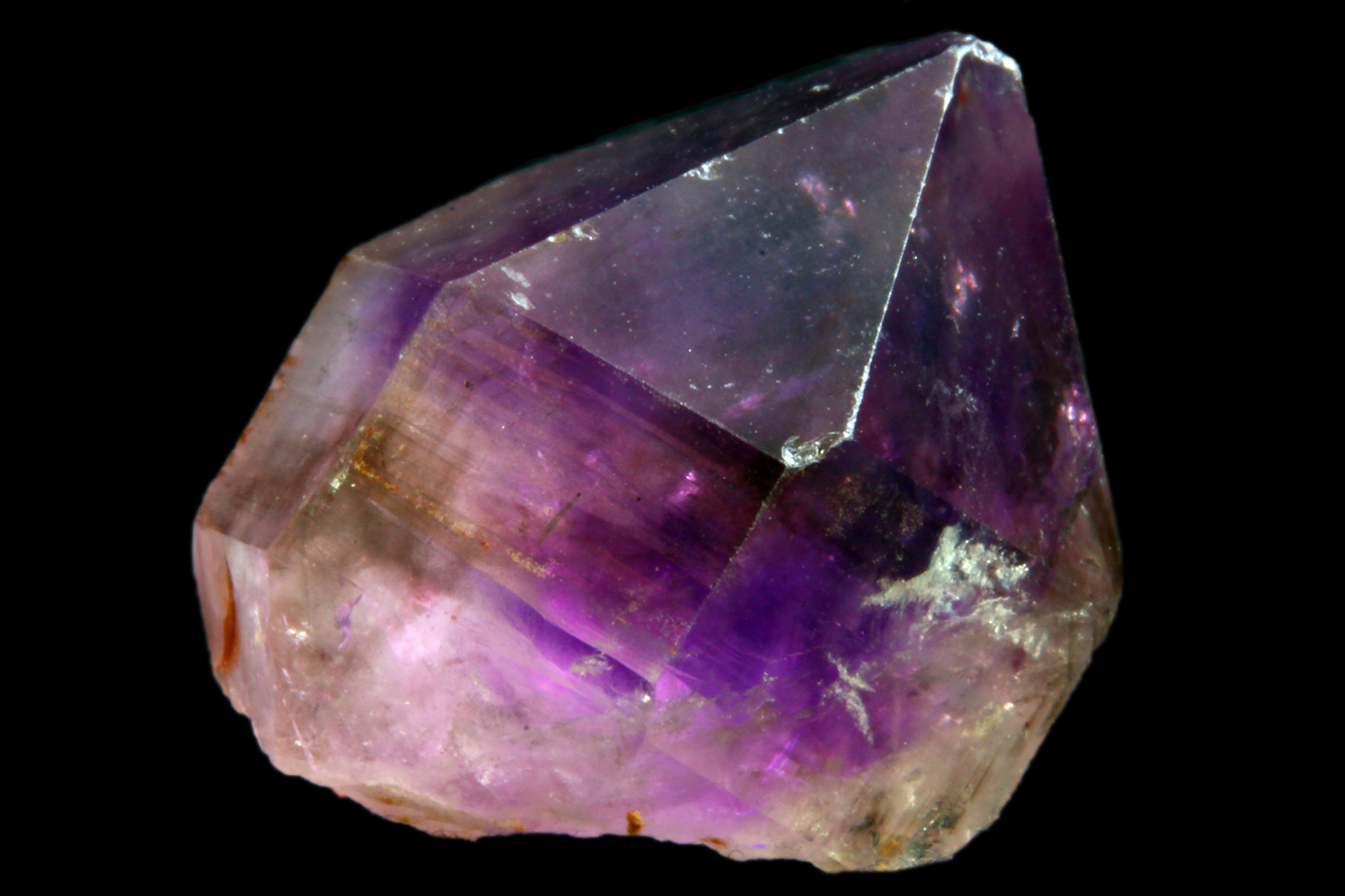 Ametyst – Priozersk, Balkhash, Kazachstan.